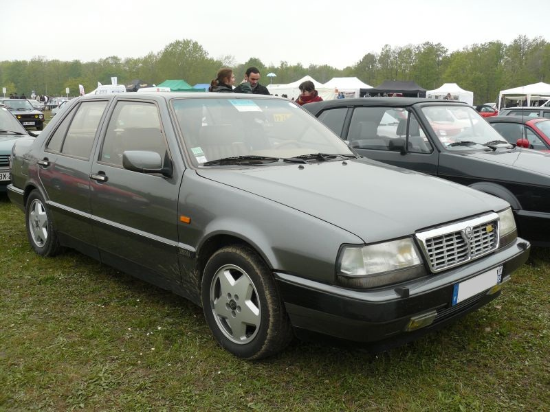 Français cadien: Montlhery Avril 2012